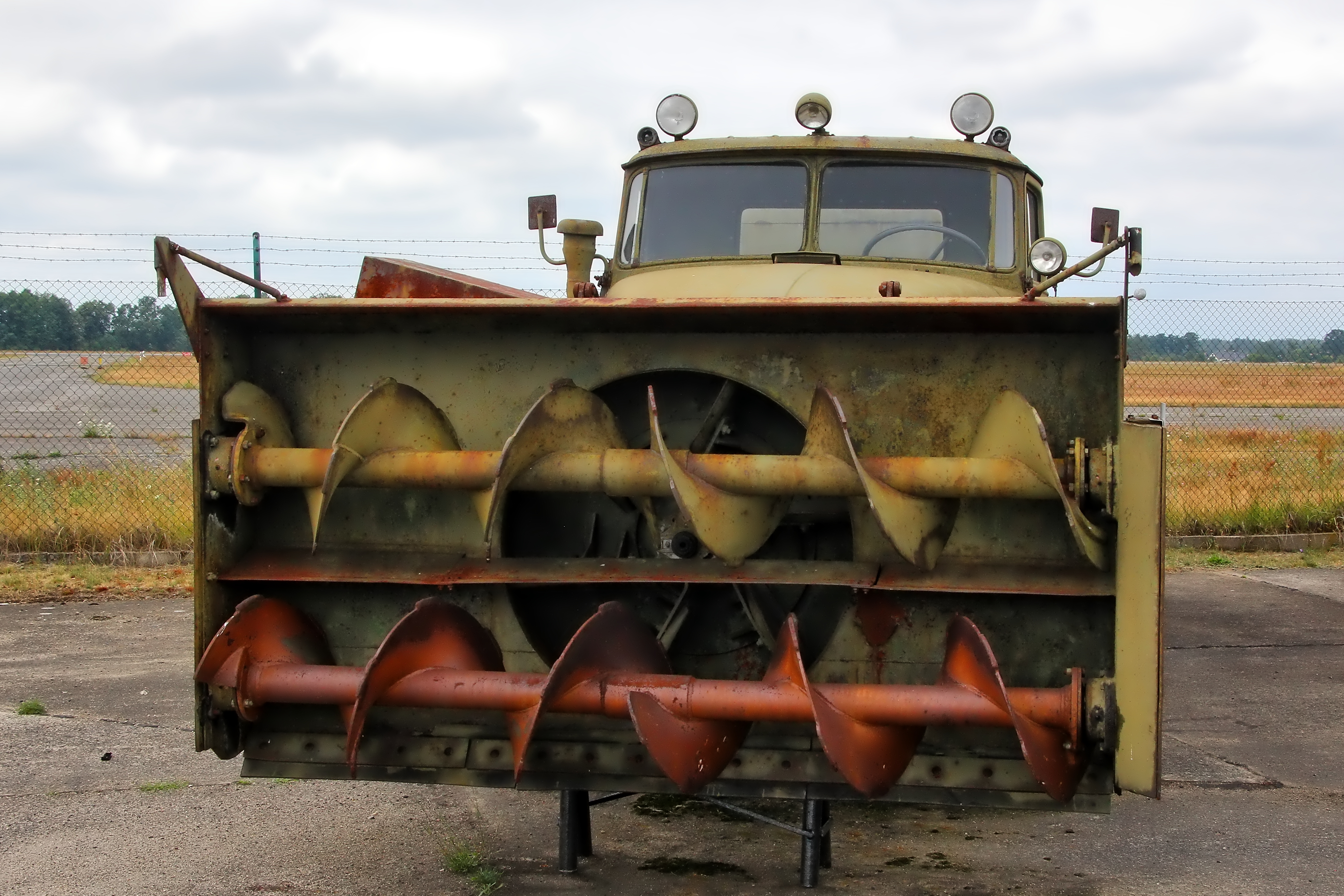 Schneefräse D-902 auf Ural-375E im Luftfahrttechnischen Museum Rothenburg, Fräswerk.